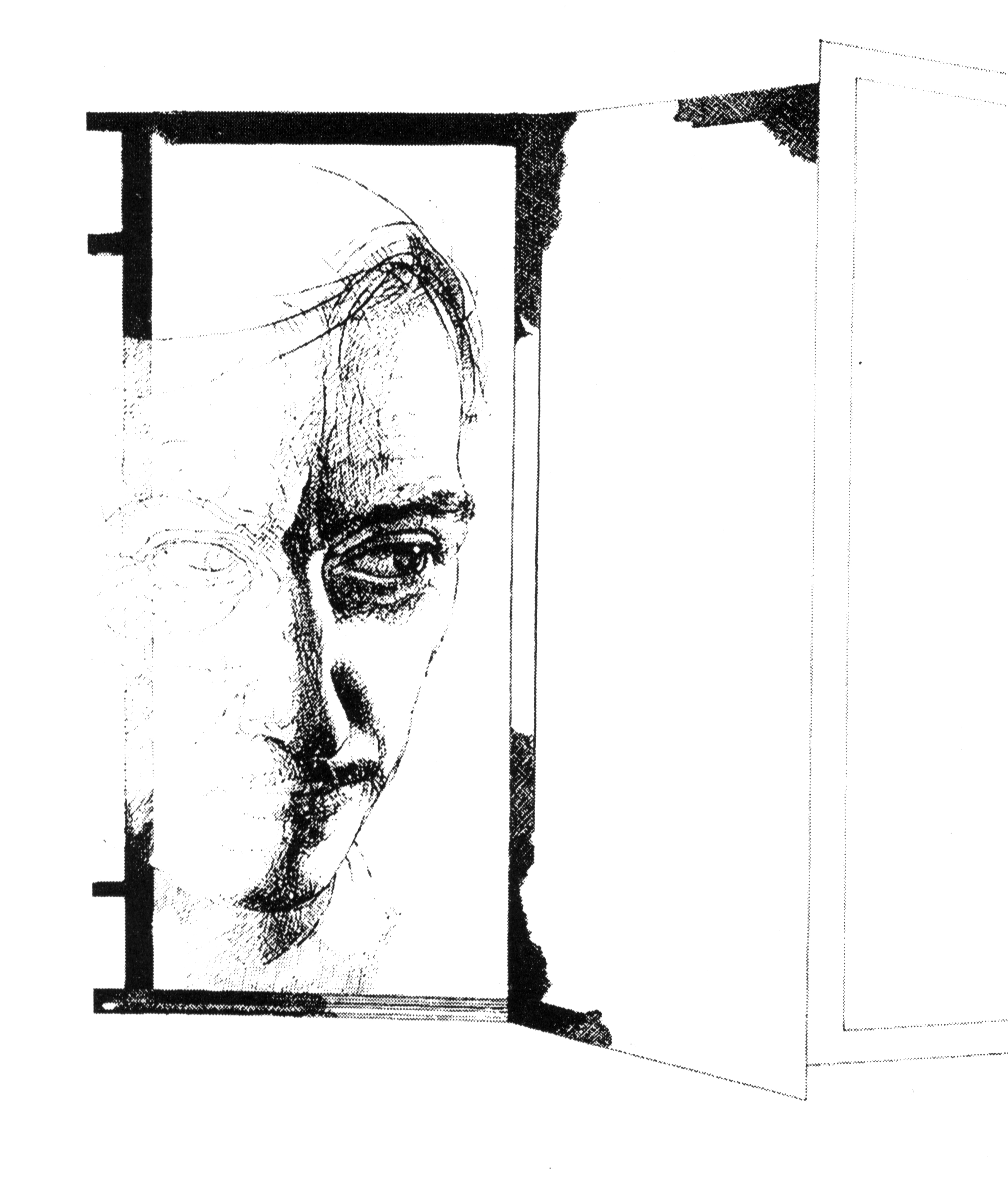 Haller József: Önarckép (részlet), 1979